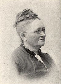 Matyhilda Langlet (1832-1904)